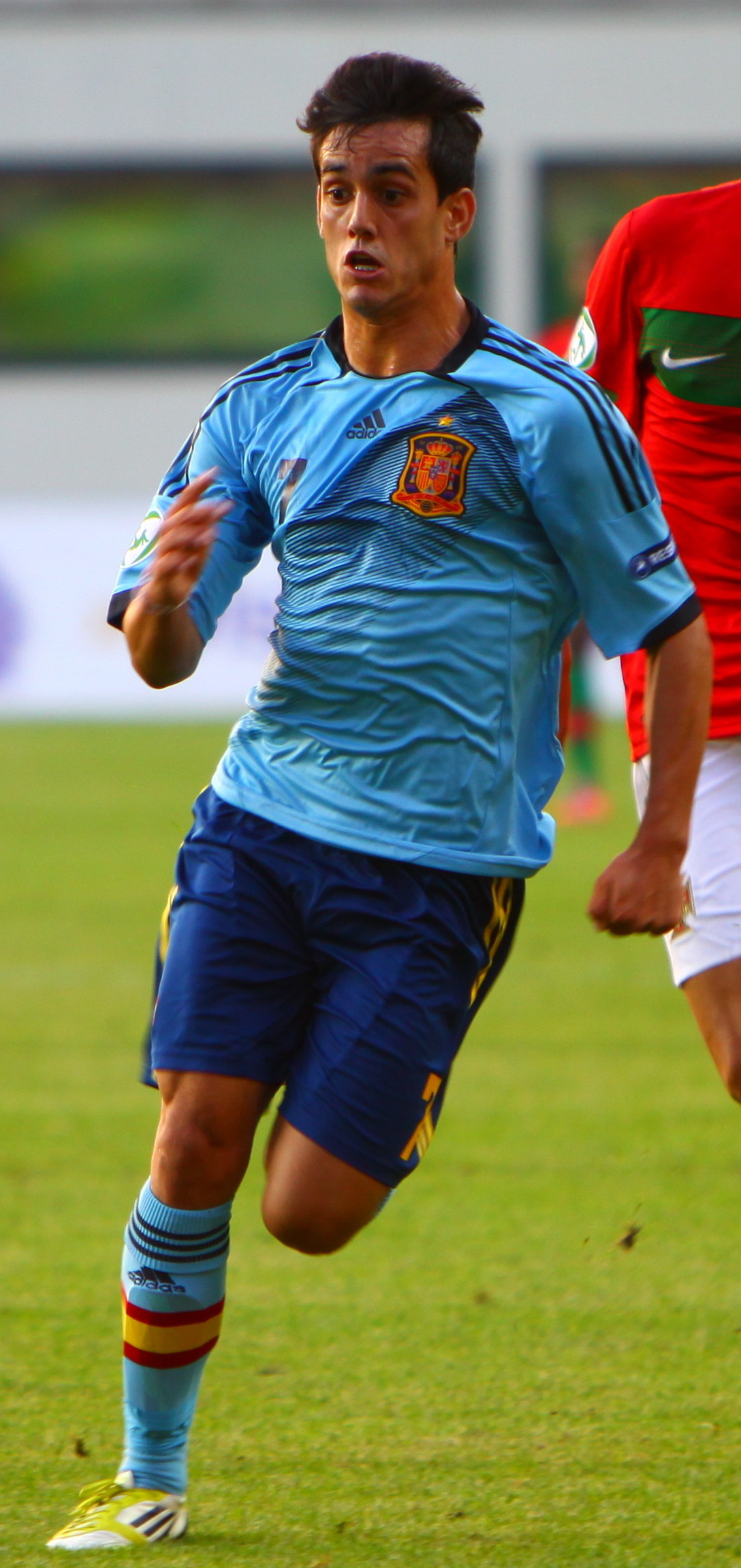 U-19 Portugal vs Spain.